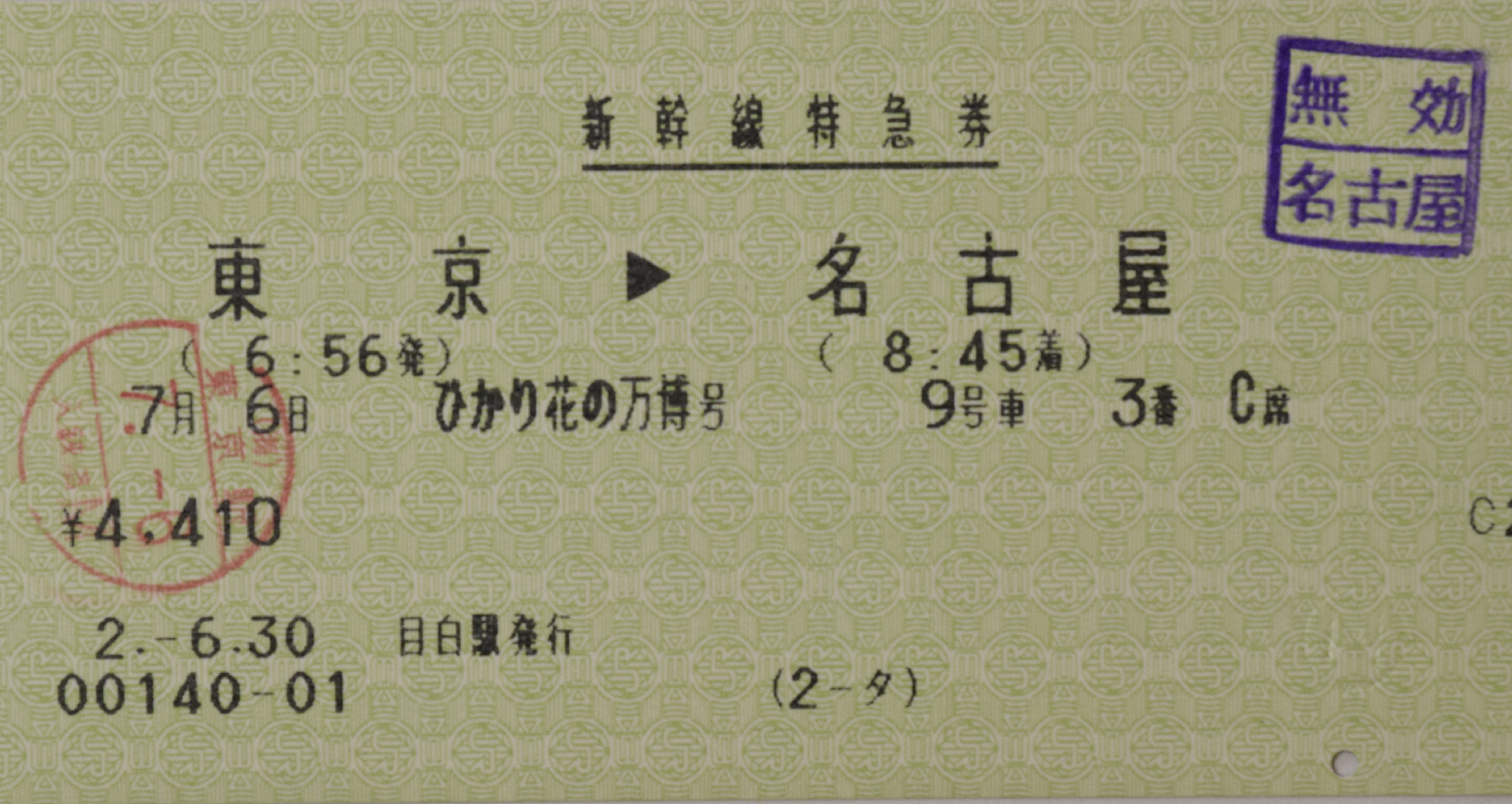 1990年に大阪で開催された国際花と緑の博覧会に合わせて運行された東海道新幹線ひかり花博号の切符